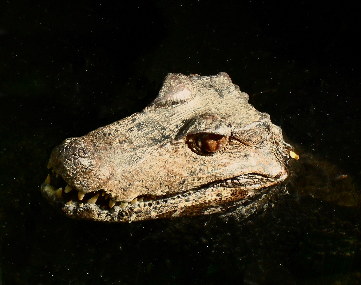 Osteolaemus tetraspis (Stumpfkrokodil) - Zoo Leipzig